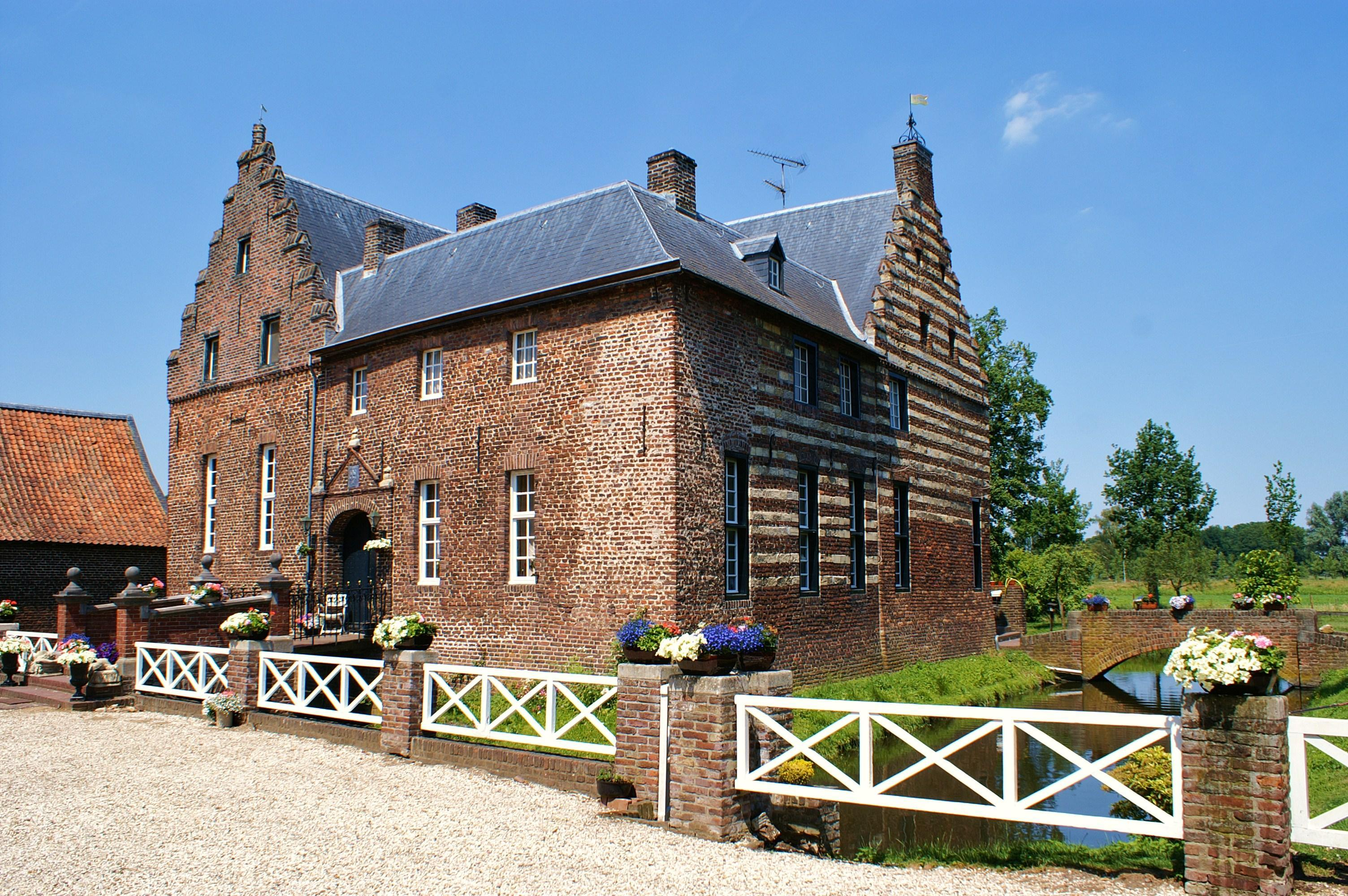 Kasteel de Borggraaf te Lottum.